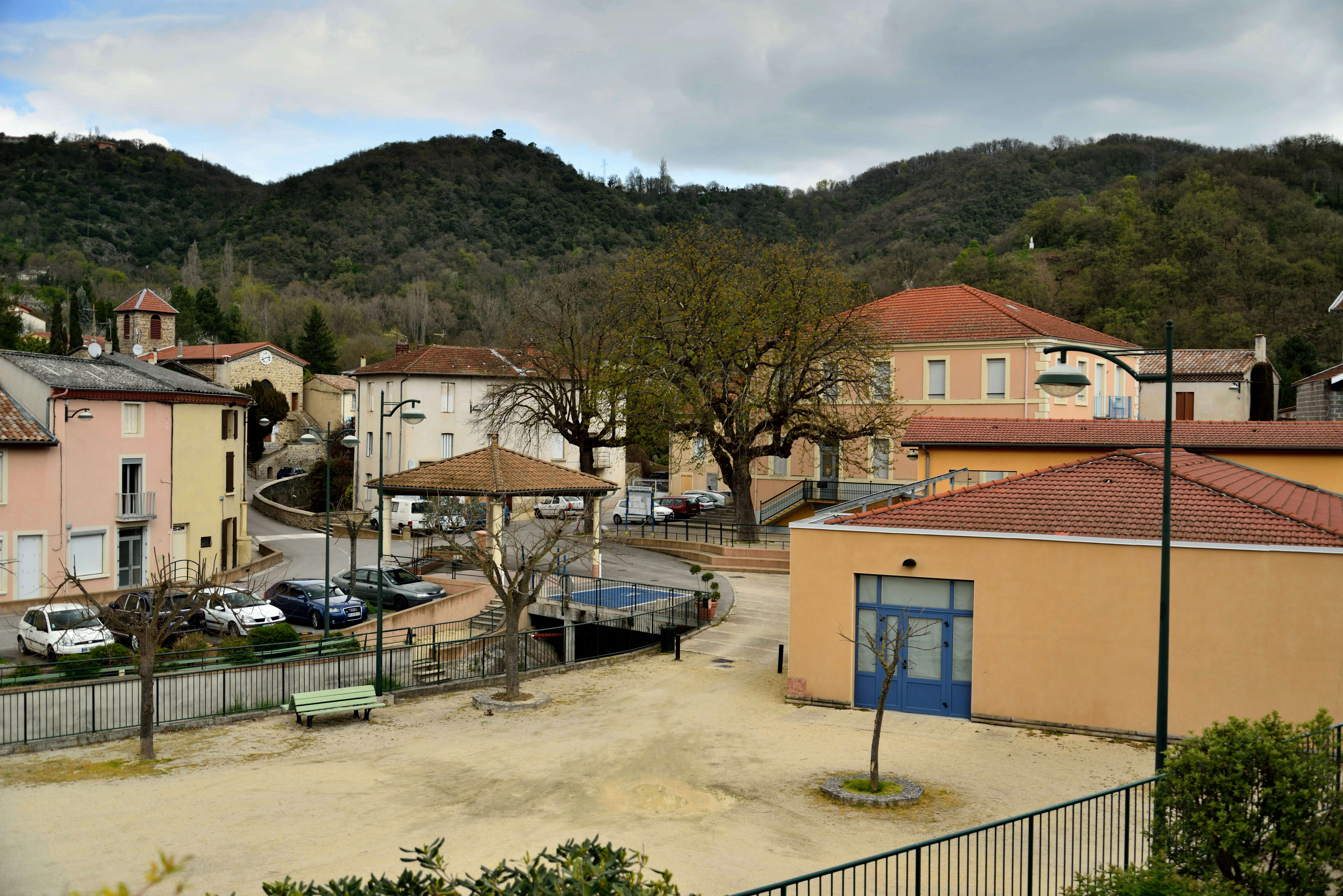 Ponsas